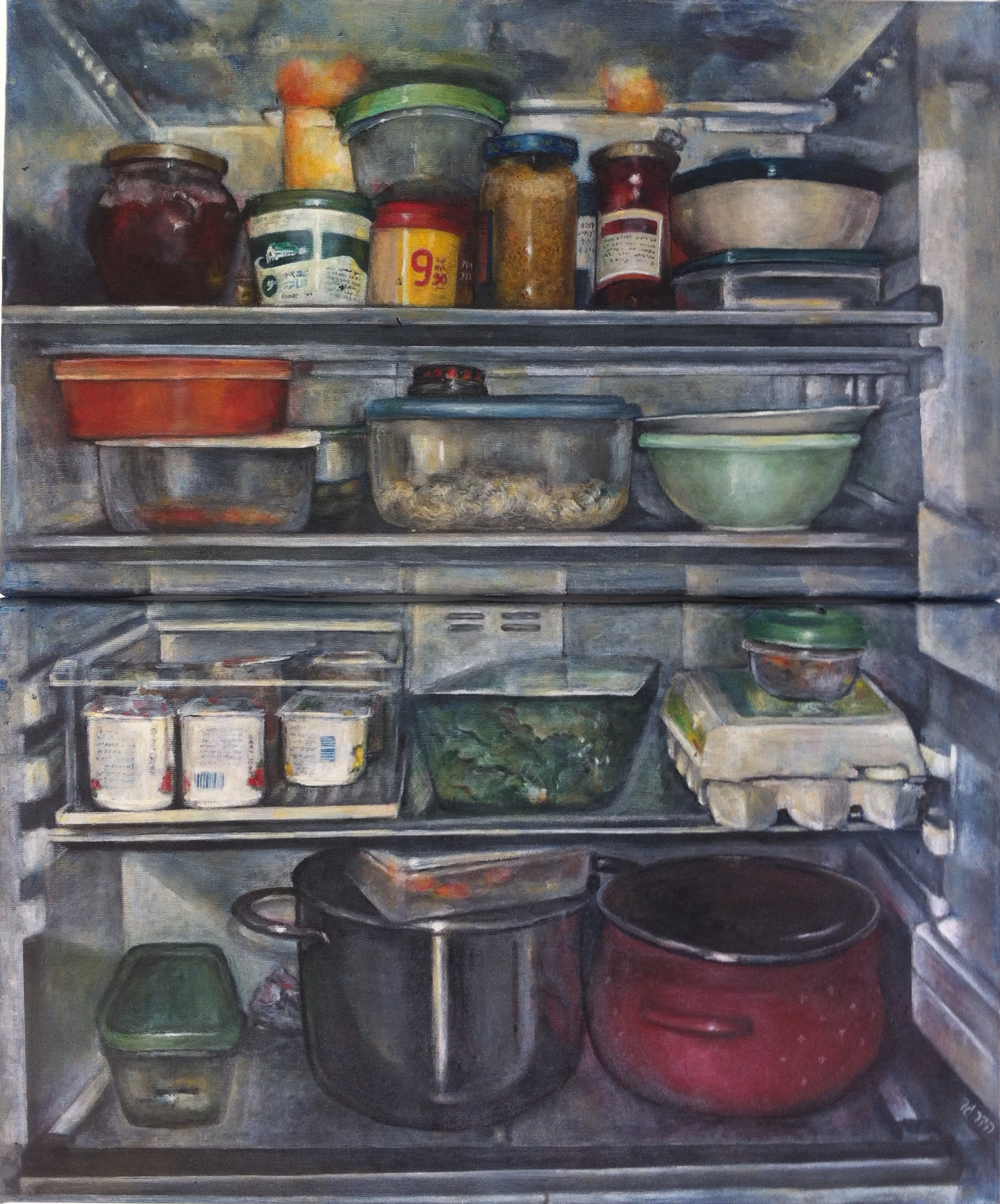 ציור מסדרת התפנימים